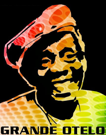 O ator e humorista brasileiro Grande Otelo (Sebastião Prata)